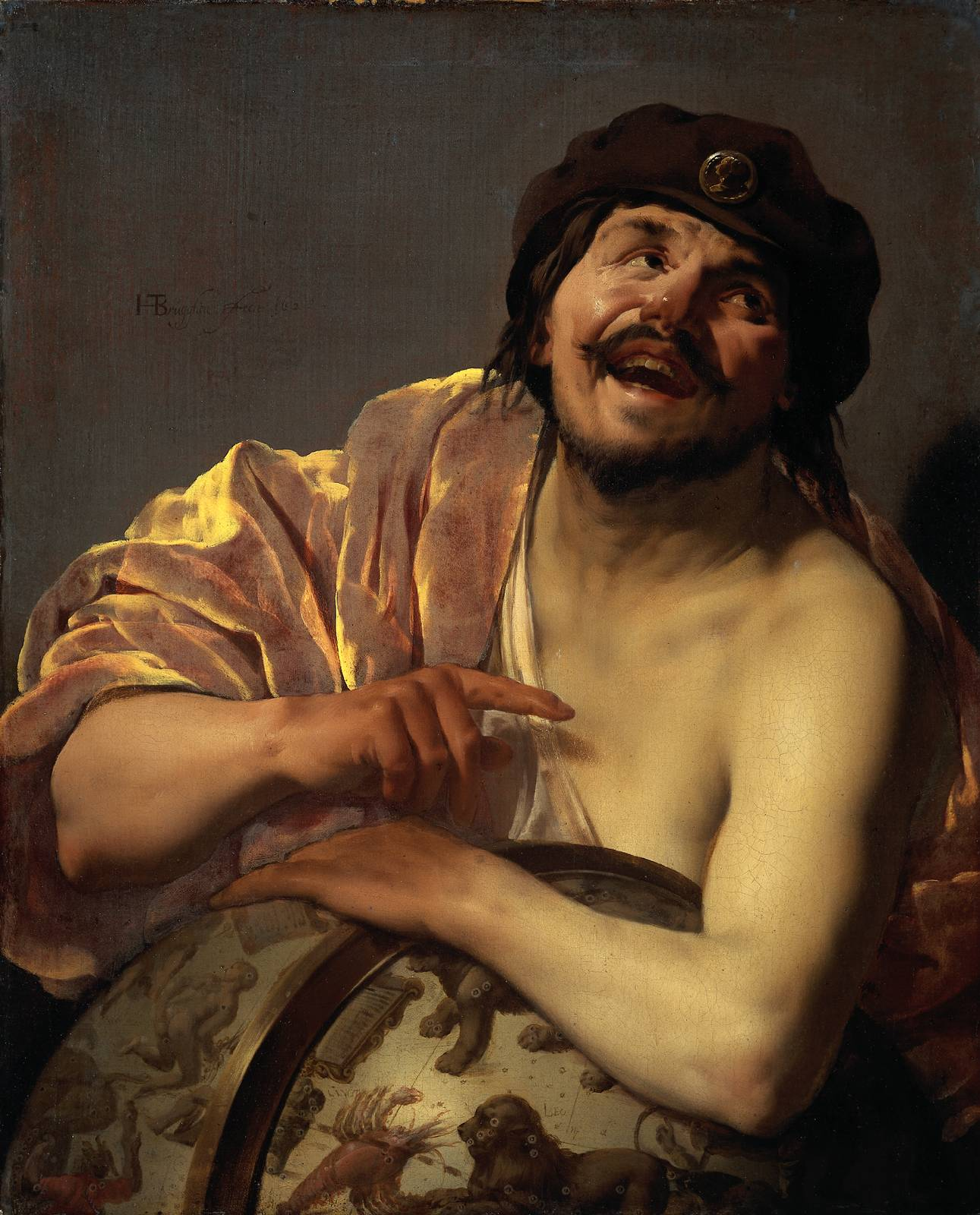 Pendant of File:Hendrik ter Brugghen - Heraclitus.jpg